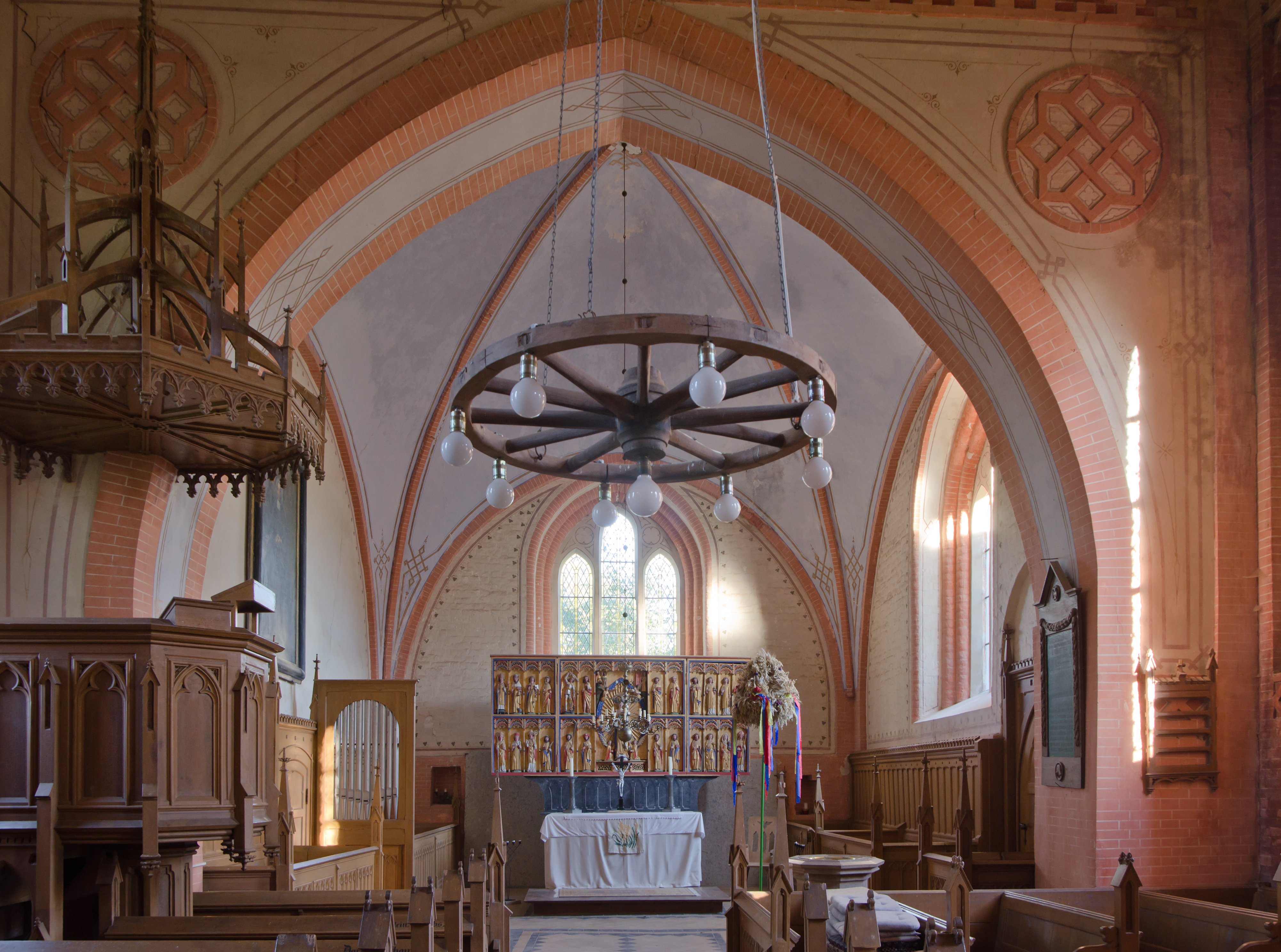 Kambs Kirche Blick Richtung Altar